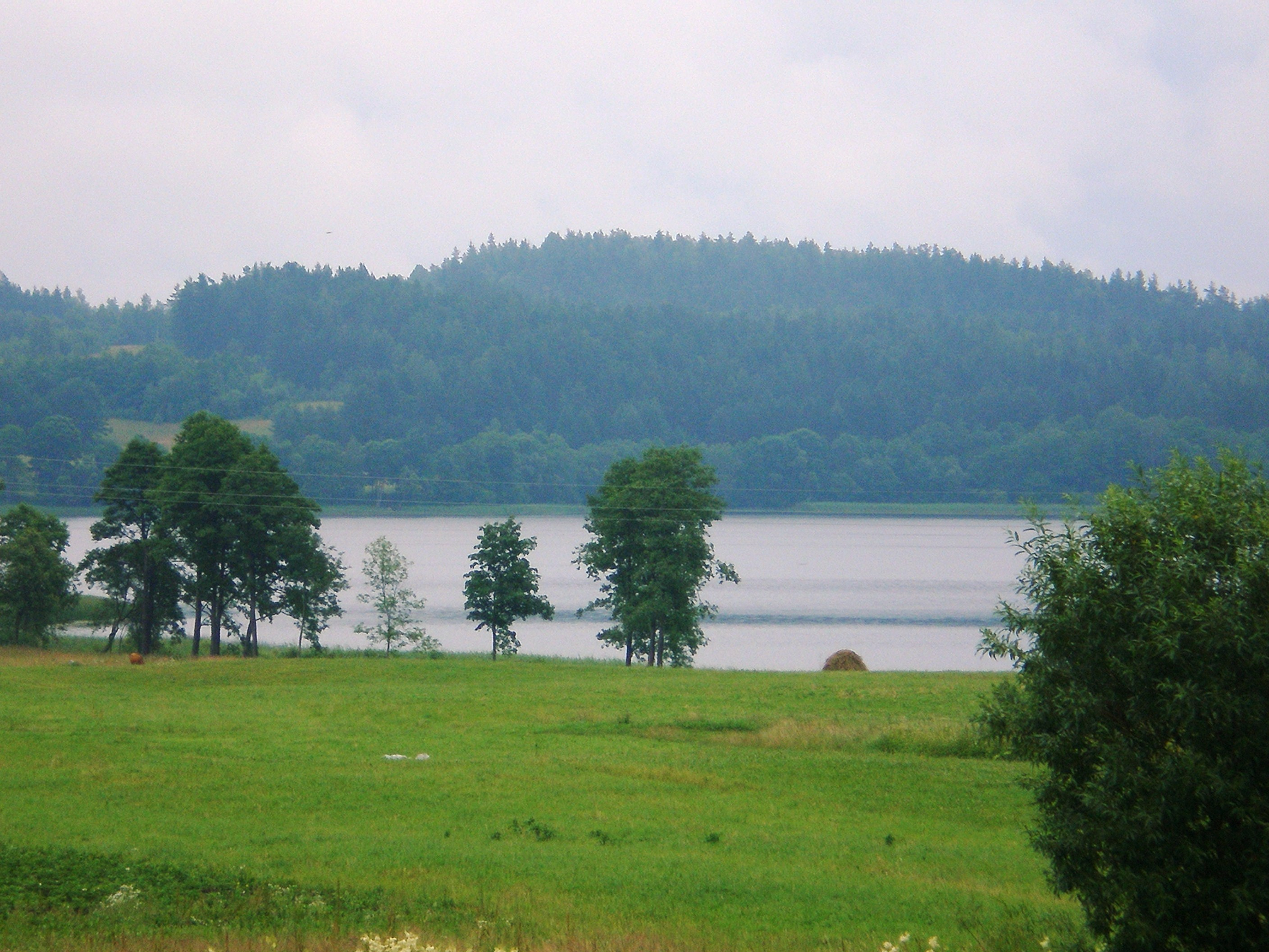 Pakasas Lake near Kirdeikiai, Lithuania